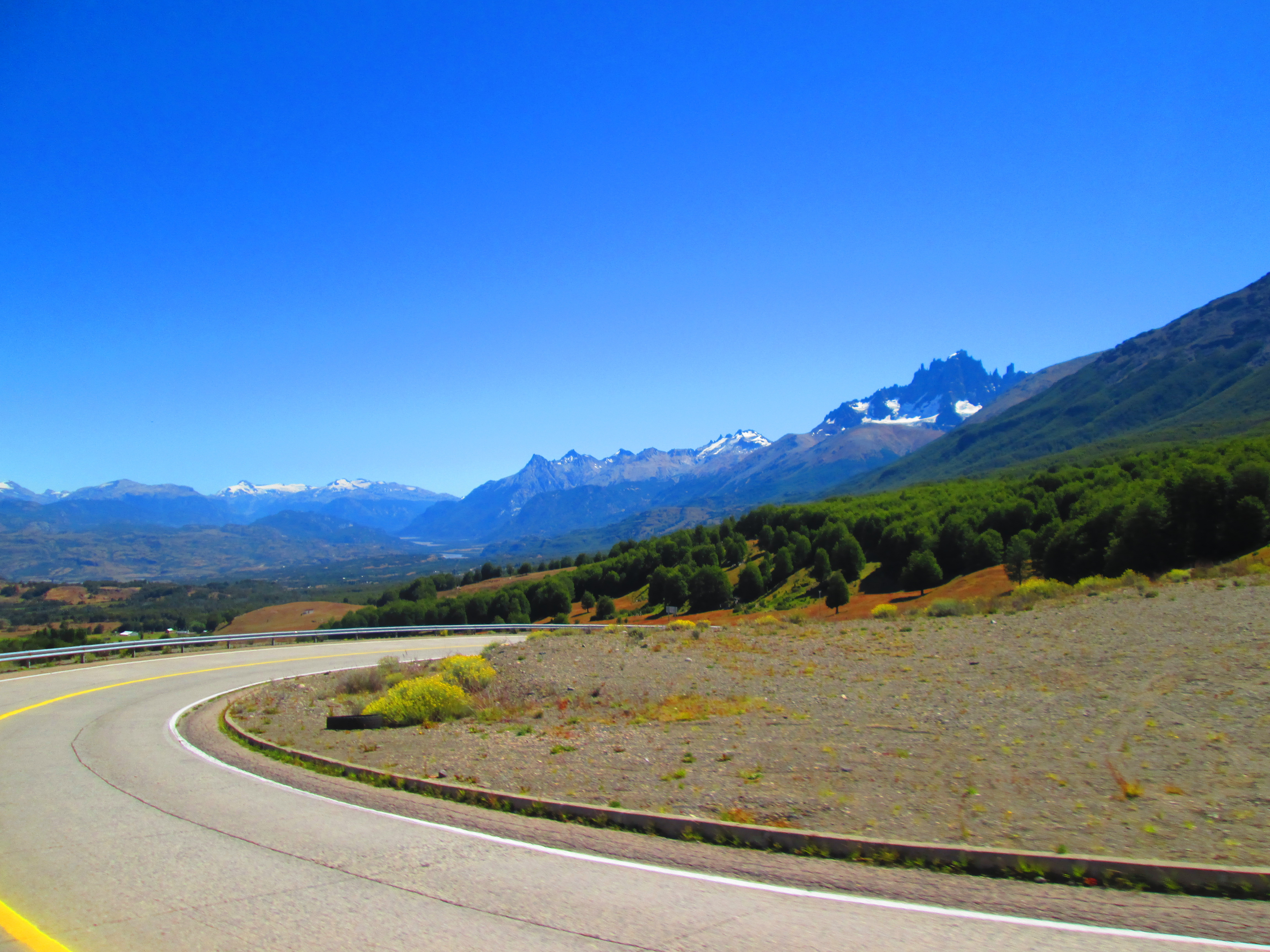 Cuesta del Diablo, vista hacia Cerro Castillo, en la Carretera Austral, región de Aysén.